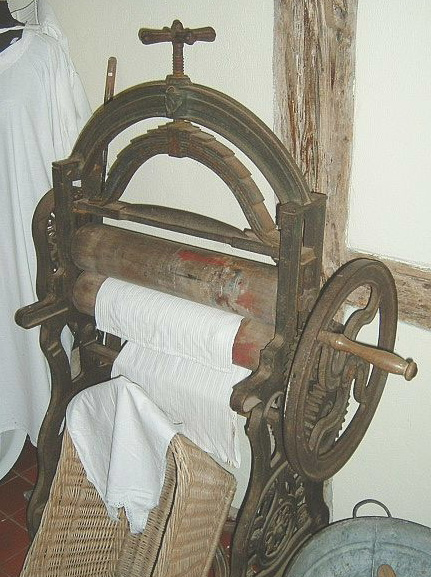 Wäschemangel (um 1930) zum Trocknen und Glätten der Wäsche